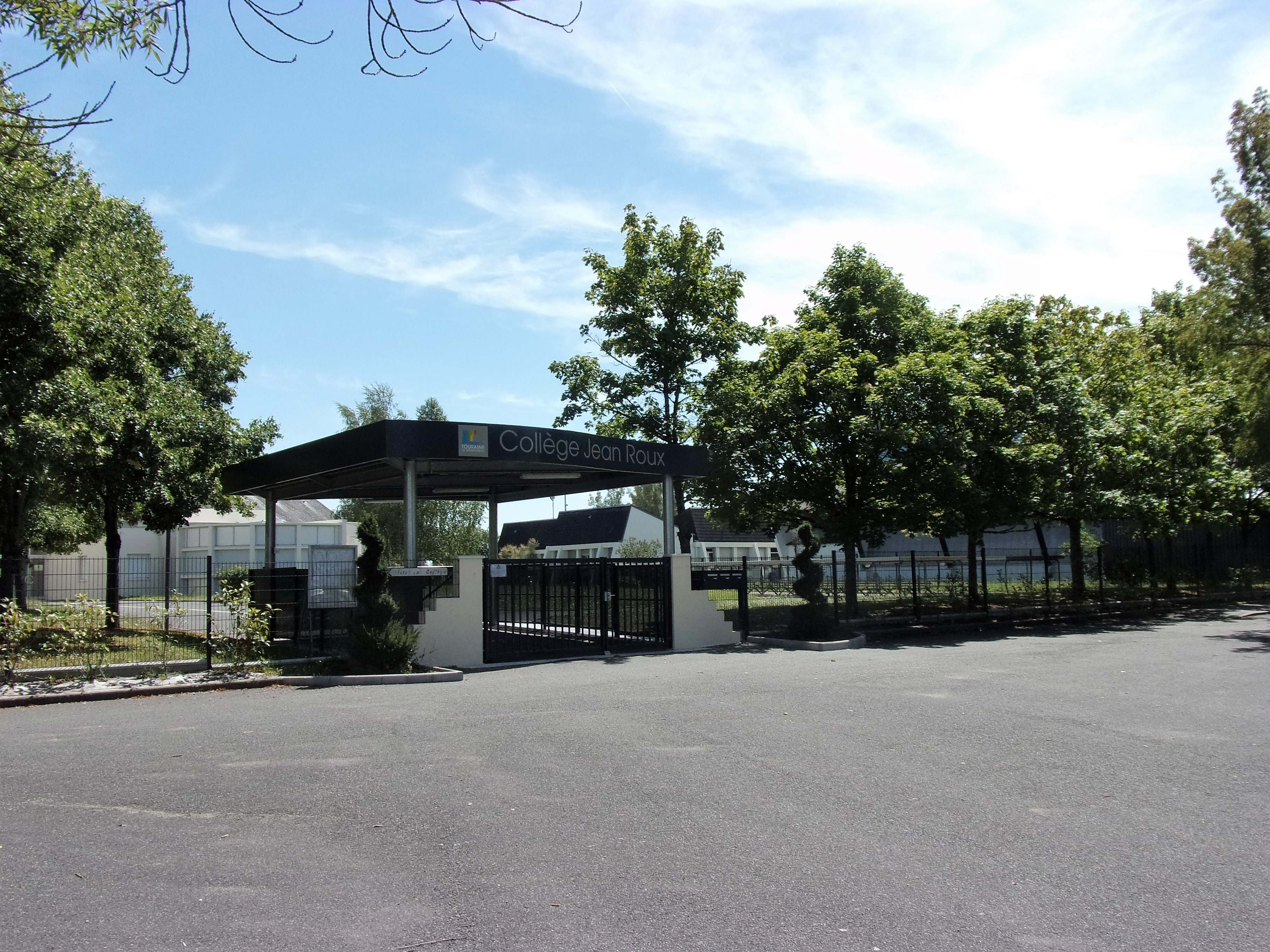 L'entrée du collège Jean-Roux à Fondettes